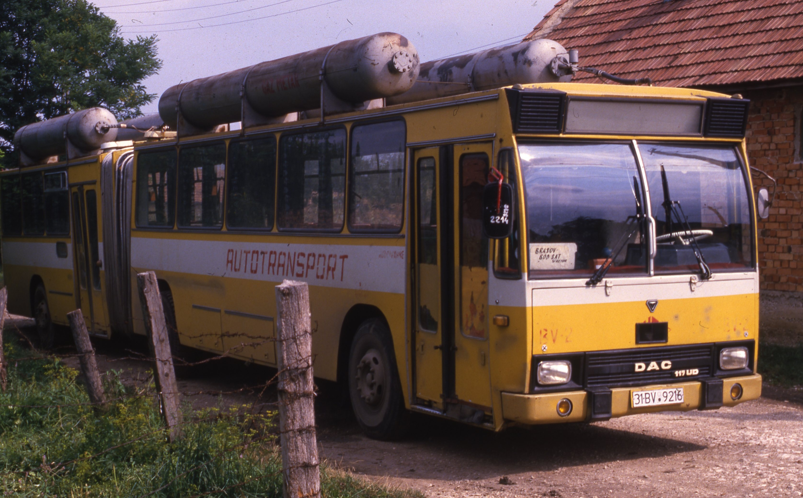 Brassó-Botfalu menetrendszerinti járat autóbusza. Location: Romania, Transylvania Tags: bus, DAC-brand, Romanian make, colorful Title: Brassó-Botfalu menetrendszerinti járat autóbusza.